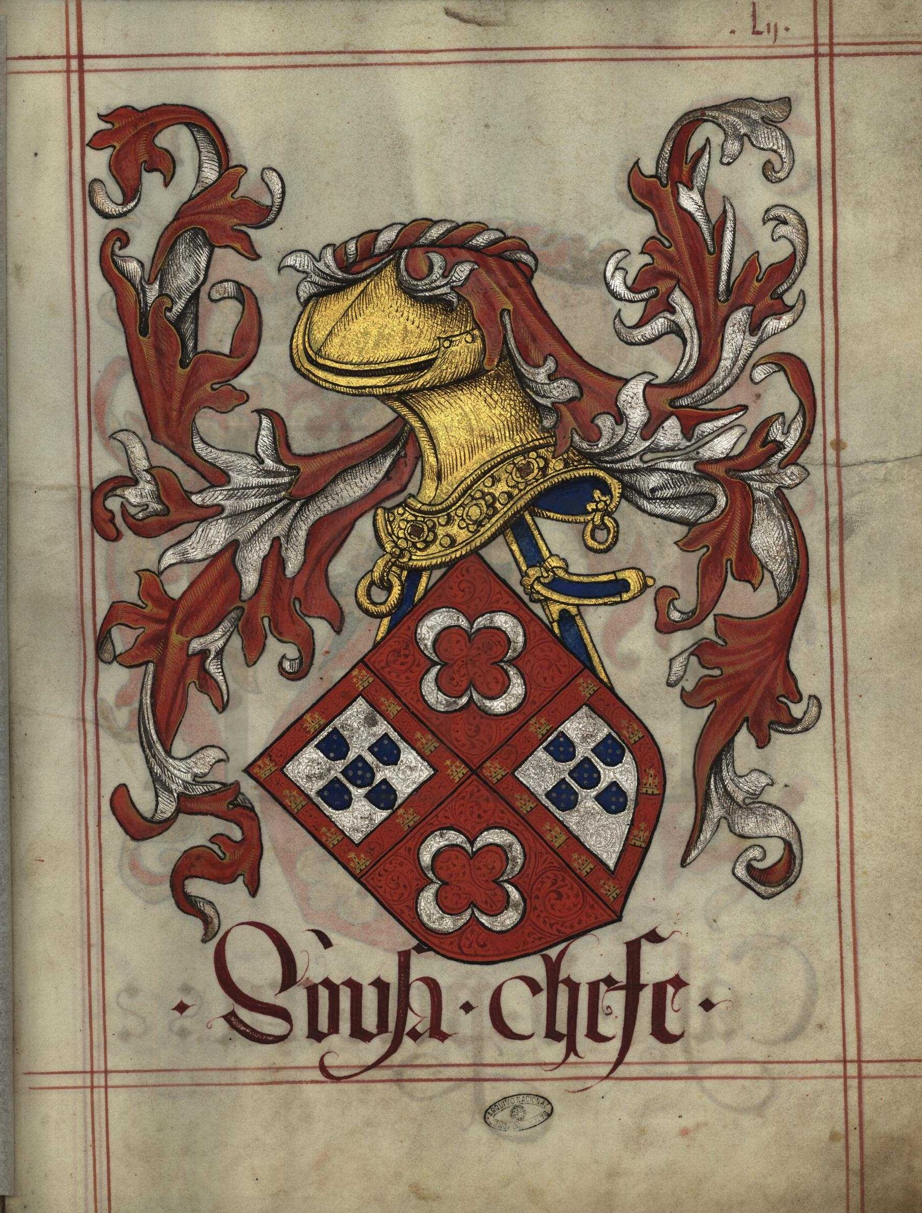 Livro do Armeiro-Mor, Sousa (fl 52)